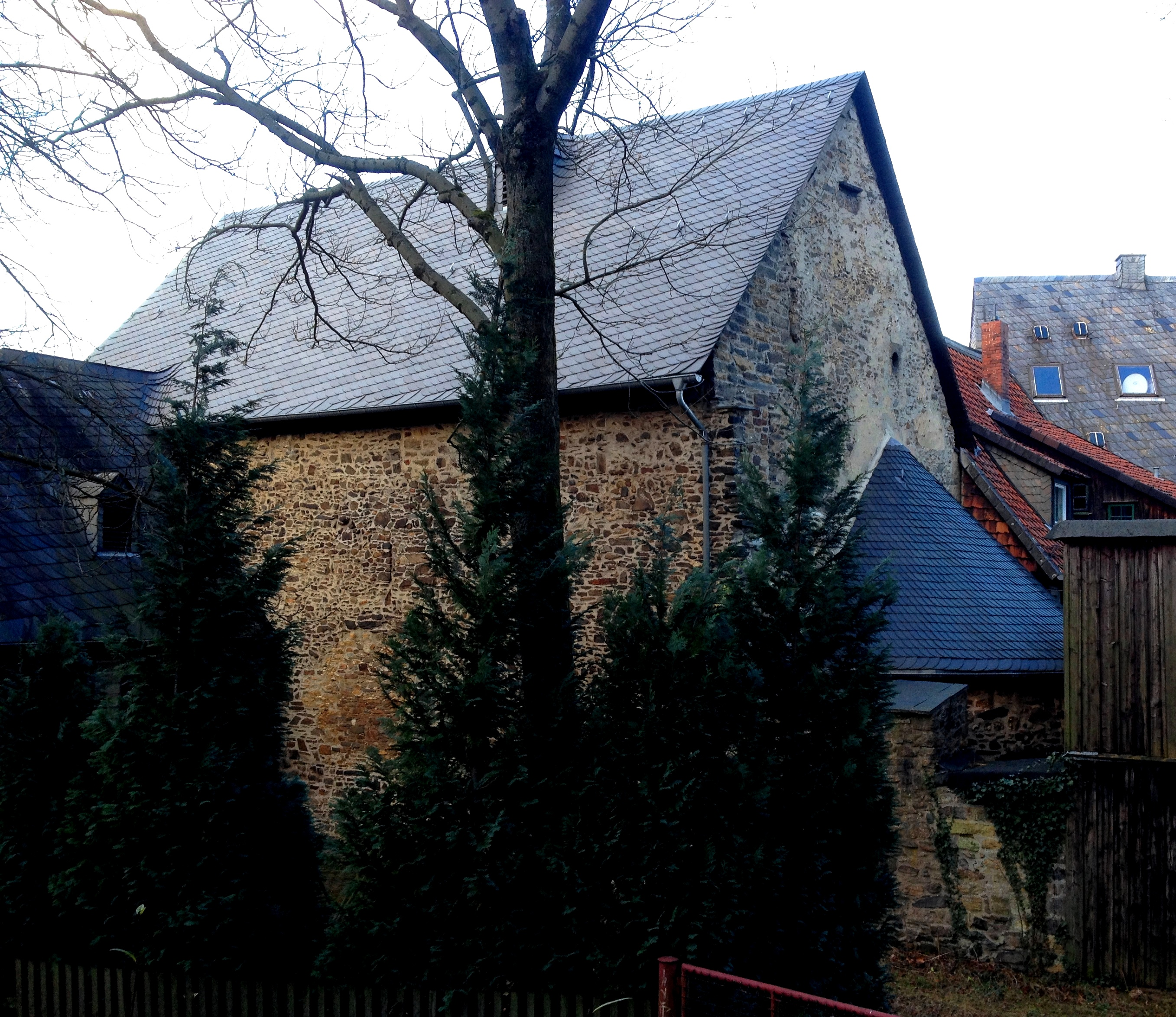 Goslar, Klauskapelle, Südostansicht